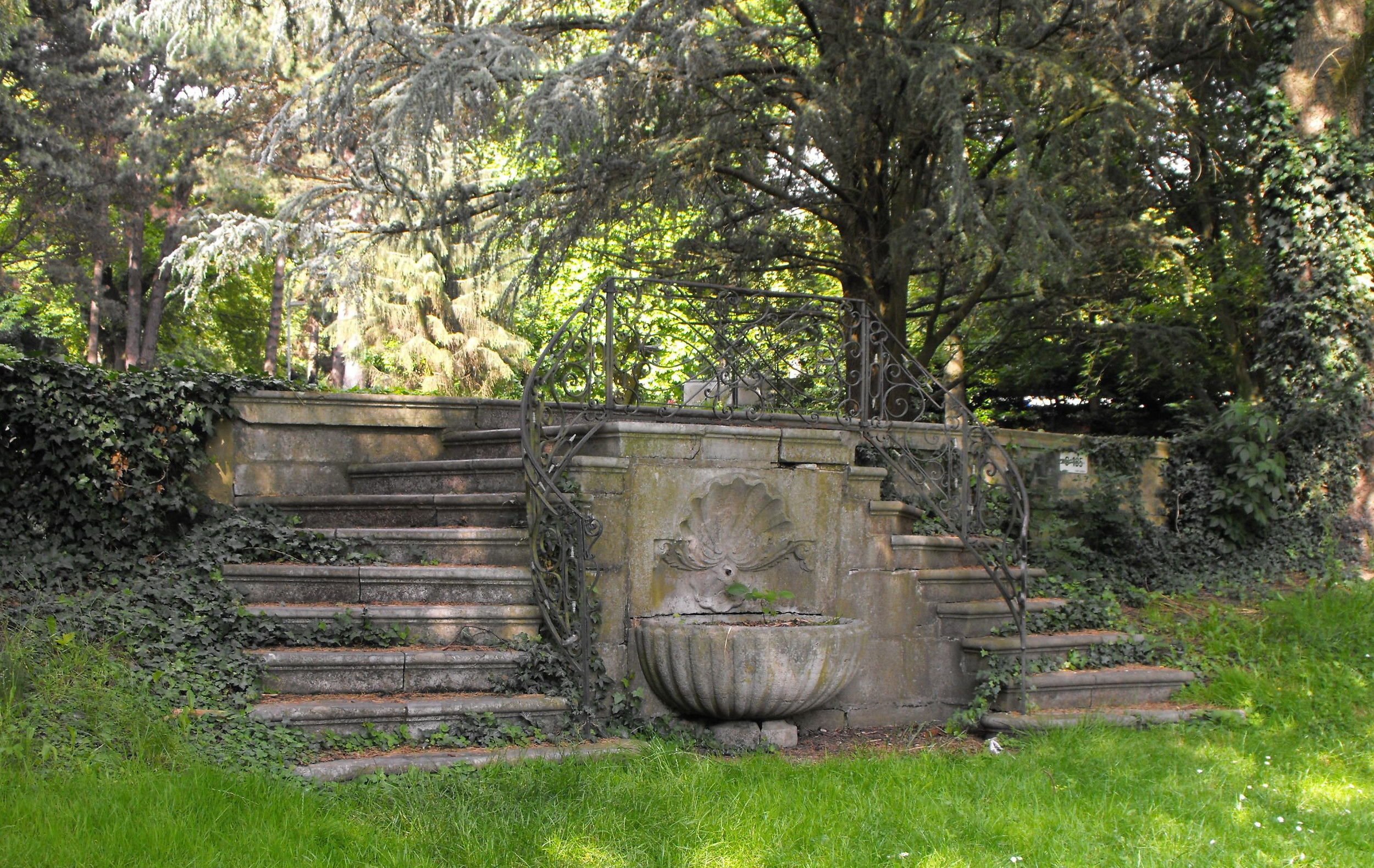 Guaita'sche Gartentreppe von Jakob Couven im Kurpark Aachen